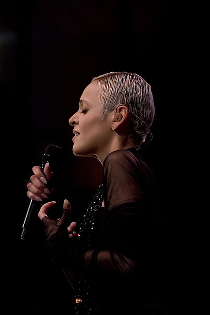 Mariza, fadista